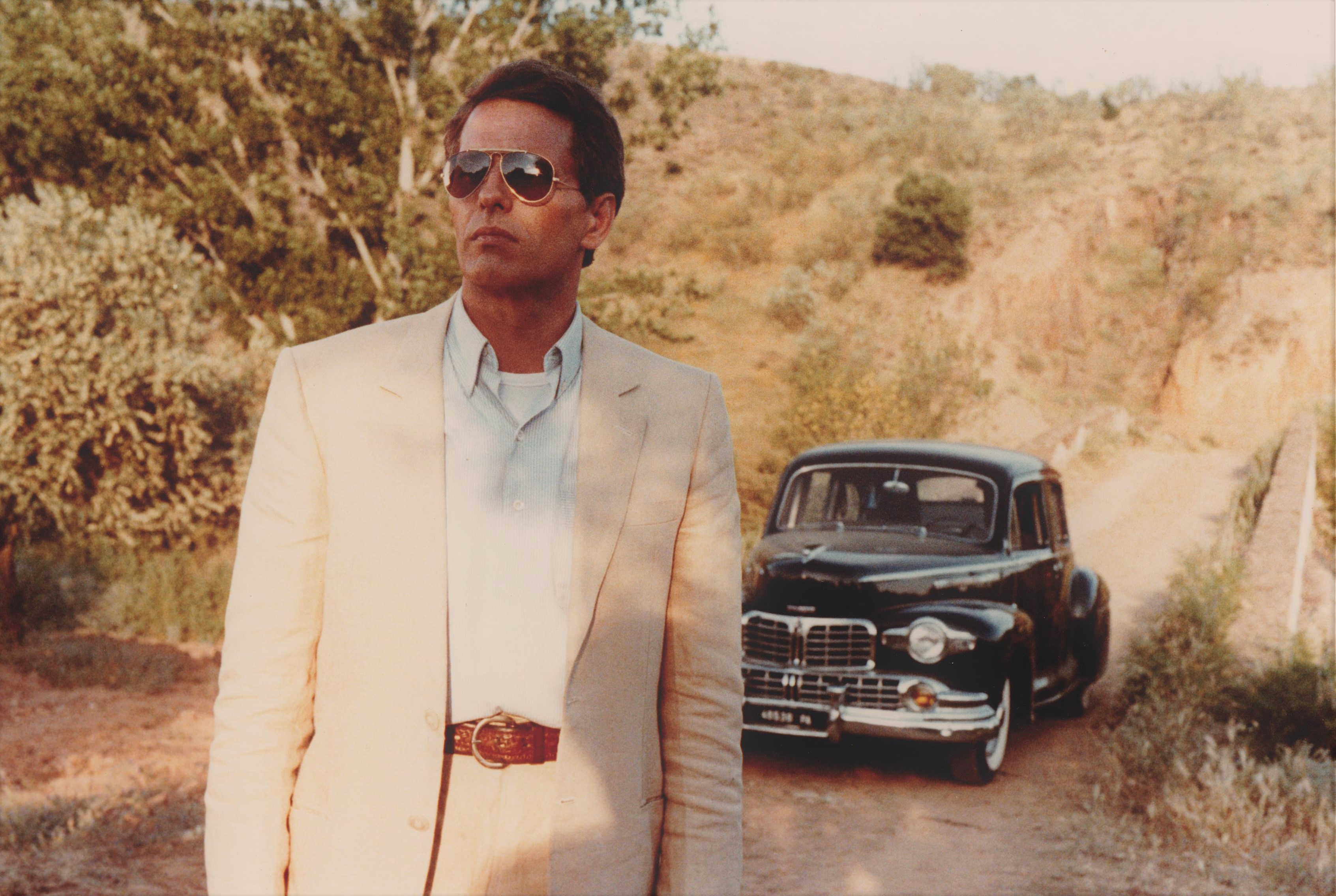 L'acteur Giuliano Gemma dans Le cercle des passions, film de Claude d'Anna, avec également Assumpta Serna, Max Von Sydow, Marcel Bozzuffi et Françoise Fabian.